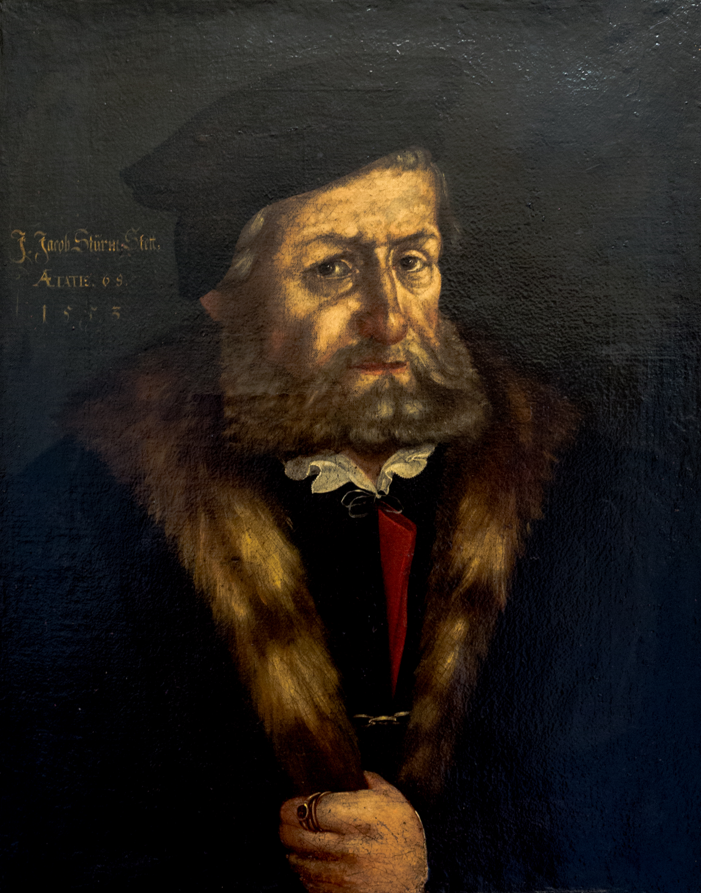 Jacques Sturm. Portrait en buste sur bois, par un peintre anonyme strasbourgeois. Peint en 1553. Collections du Chapitre de Saint-Thomas à Strasbourg.